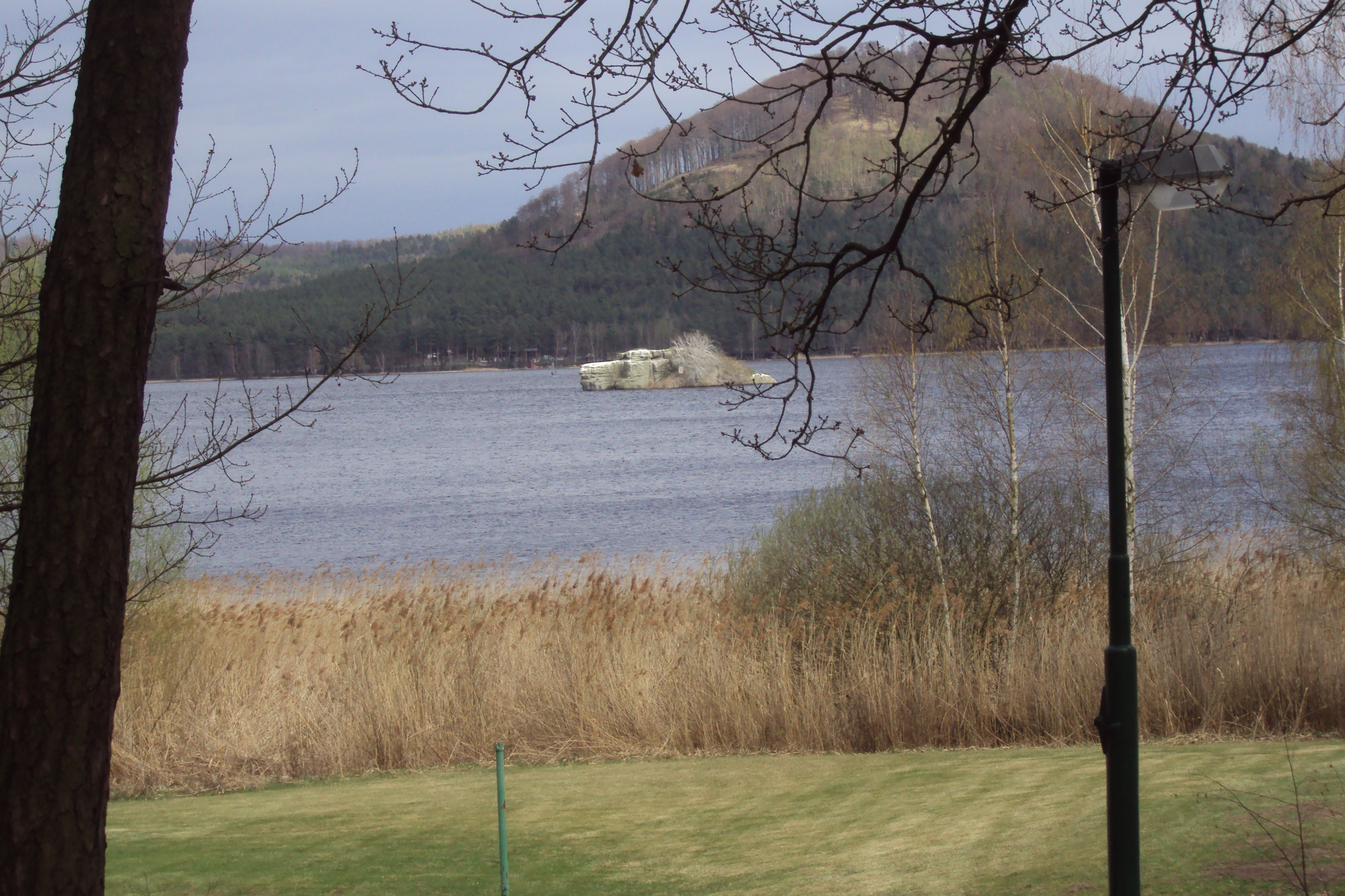 Máchovo jezero, ostrůvek Myšlín , za ním vrch Borný